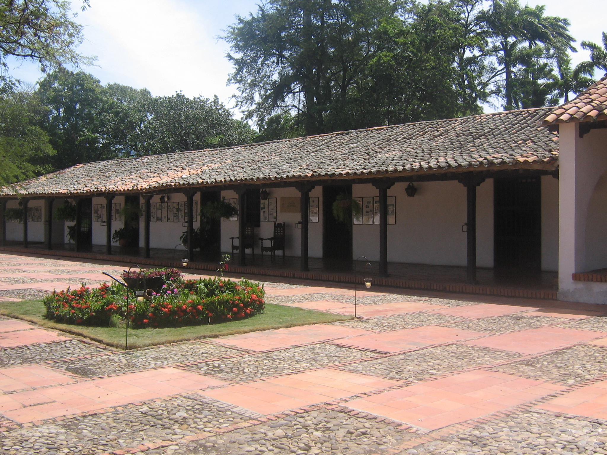 Casa donde nacio Francisco de Paula de Paula Santander